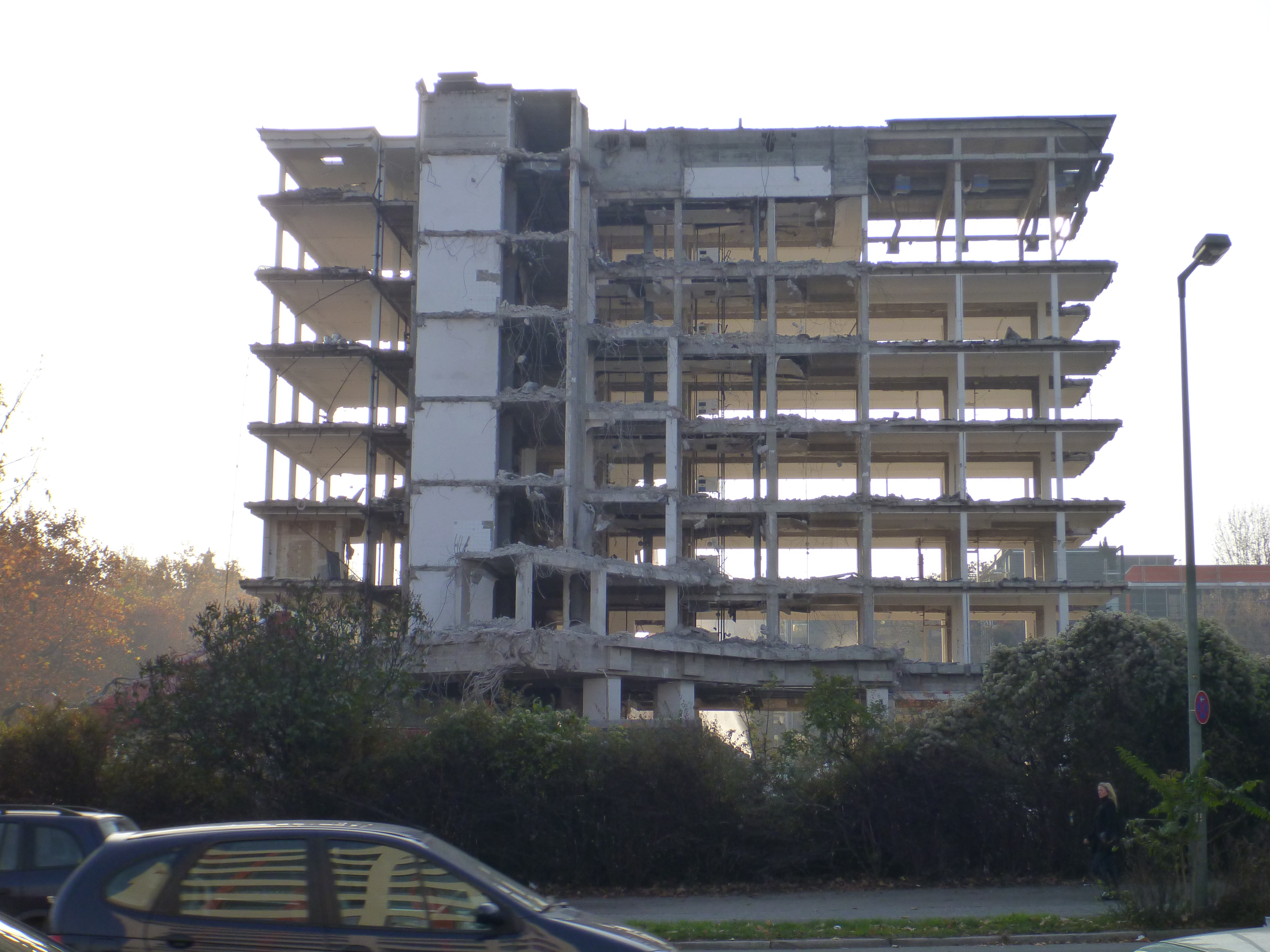 Abriß des ehemaligen Verwaltungsgebäudes des Evangelischen Konsistorium Berlin